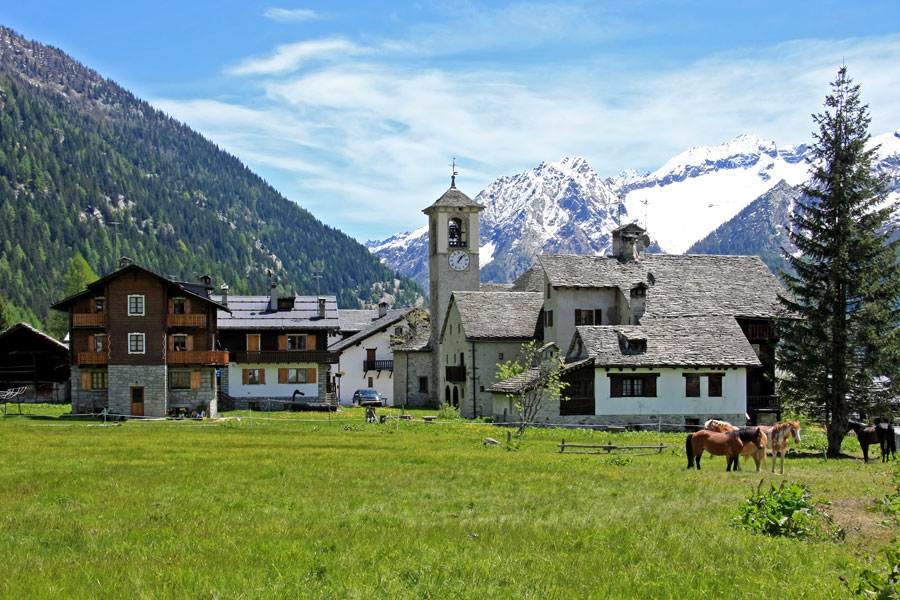 Macugnaga, scorcio della frazione Pecetto